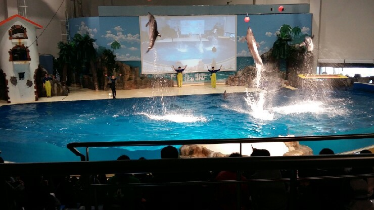 조선말: 제주 아쿠아플라넷 돌고래쇼